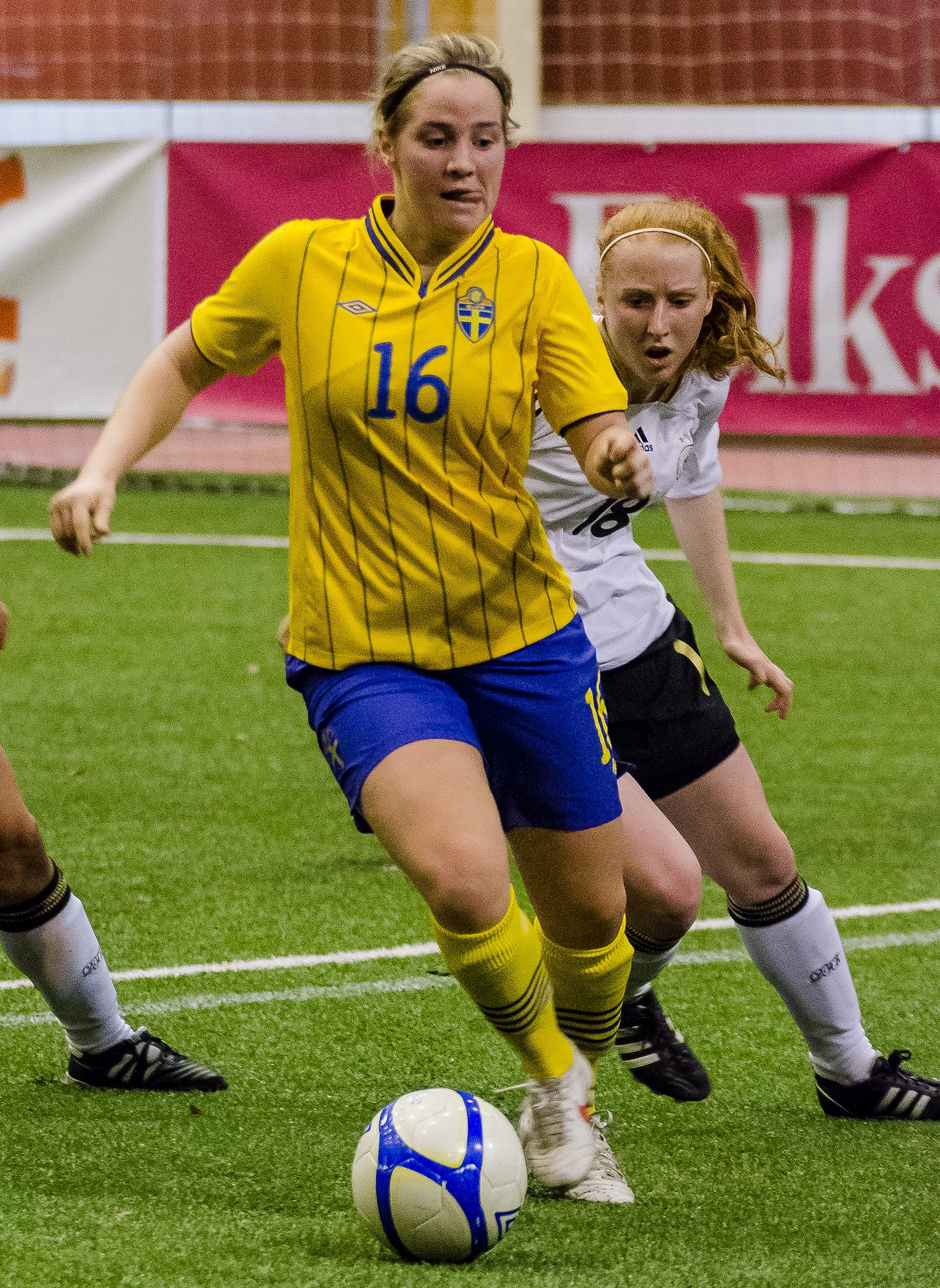 Irma Helin spelar F18-landskamp mellan Sverige och Tyskland i Växjö Tipshall, 21/11 2012.